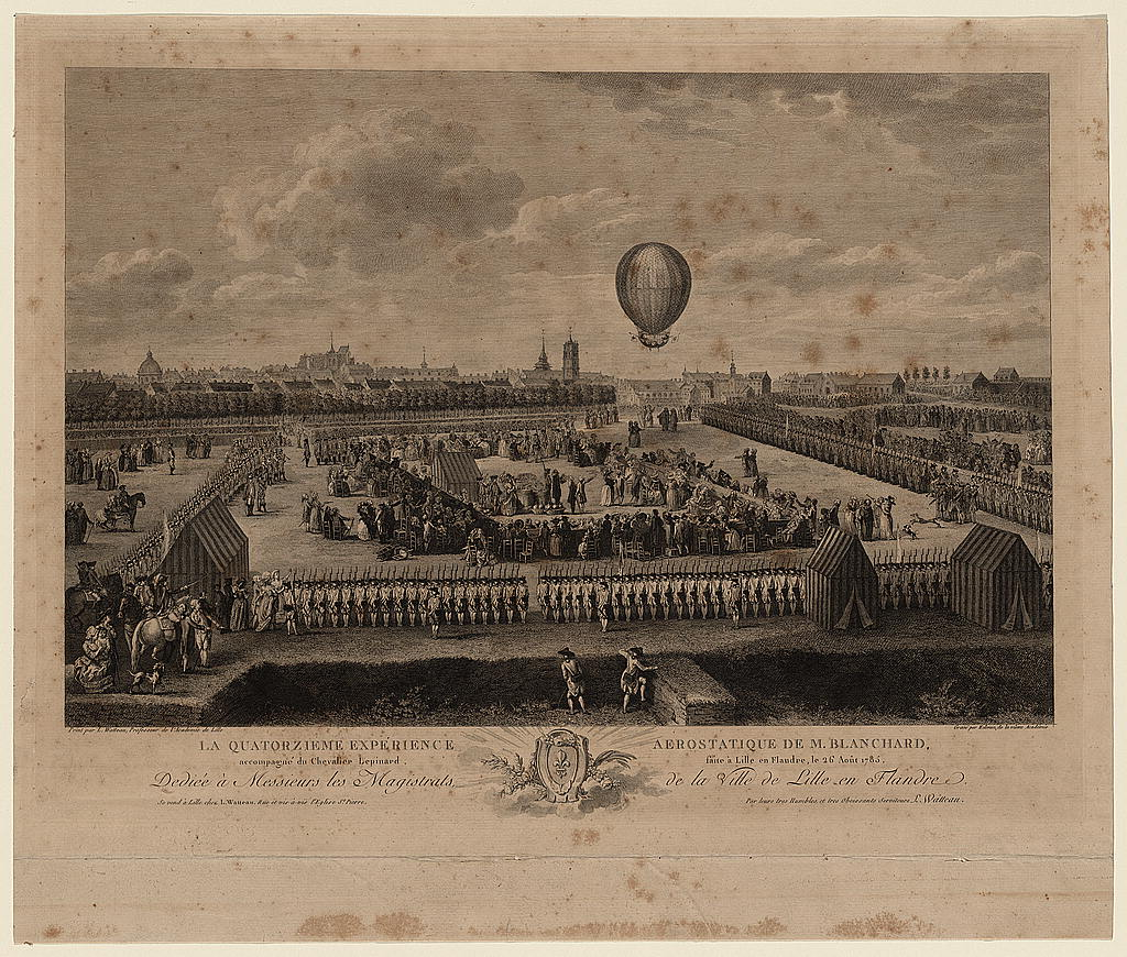 La quatorzieme expérience aerostatique de M. Blanchard accompagné du Chevalier Lepinard faite à Lille en Flandre, le 26 août 1785 Dediée à Messieurs les Magistrats de la ville de Lille en Flandre / Peint par L. Watteau, professeur de l'Académie de Lille ; Gravé par Helman, de la même Académie./ Print shows the balloon of Jean-Pierre Blanchard ascending from Lille, France.